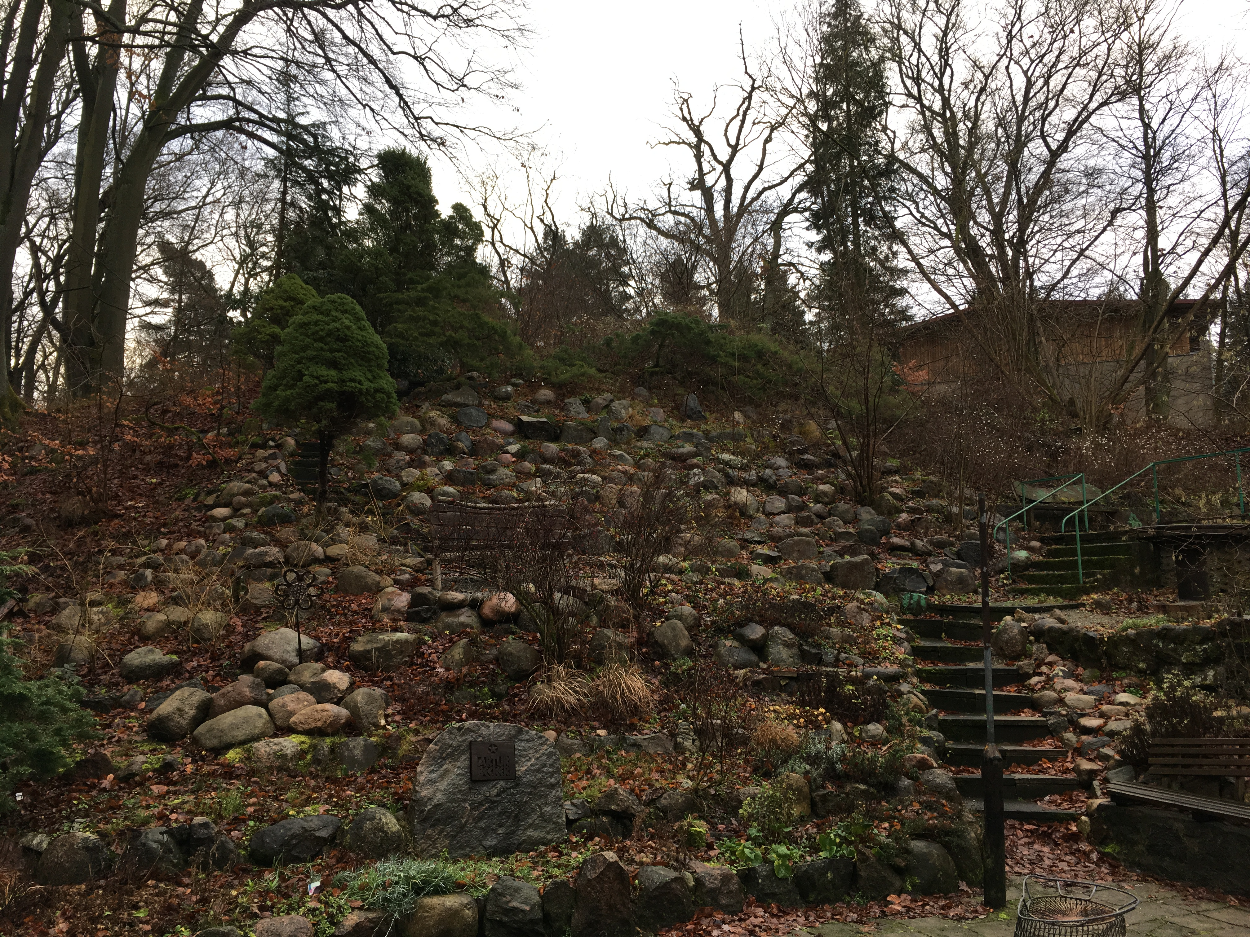 Kuhlmühle, ein Wohnplatz von Wittstock/Dosse im Landkreis Ostprignitz-Ruppin in Brandenburg